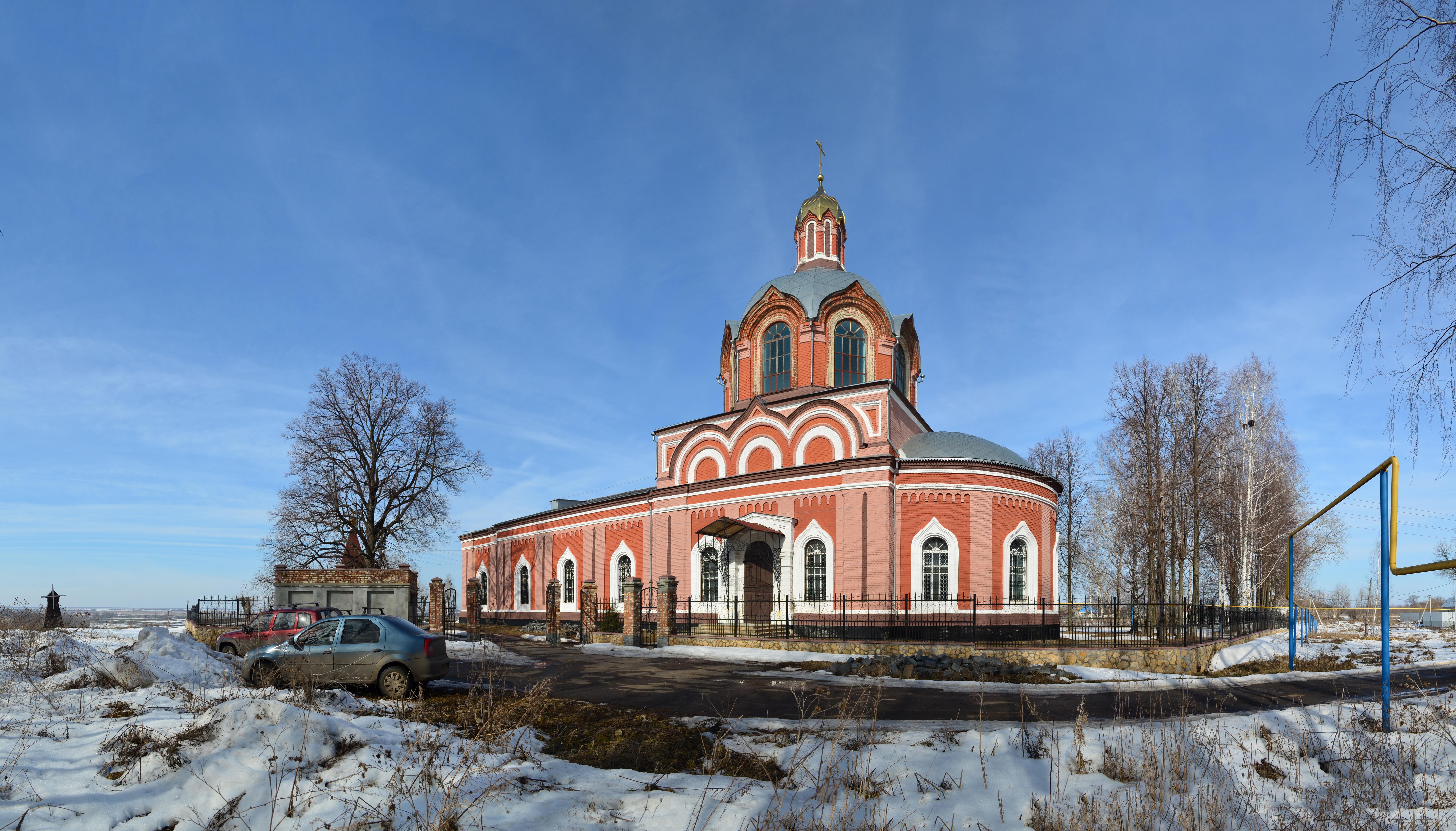 Рязанская область,Кораблинский район,село Семион.Церковь Боголюбской Божией матери с приделом Преподобного Симеона Столпника.19 век.